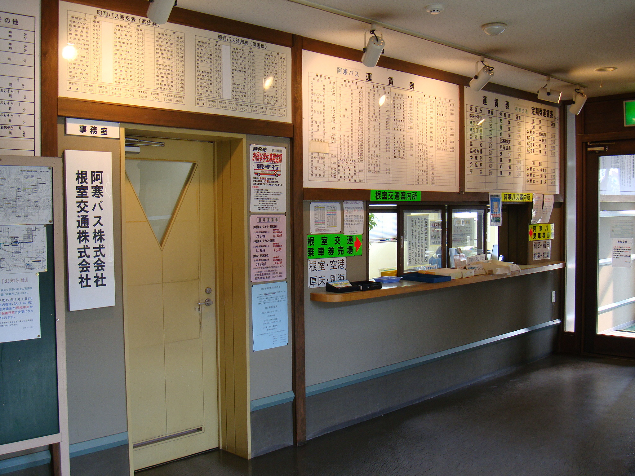 Naka-Shibetsu depot